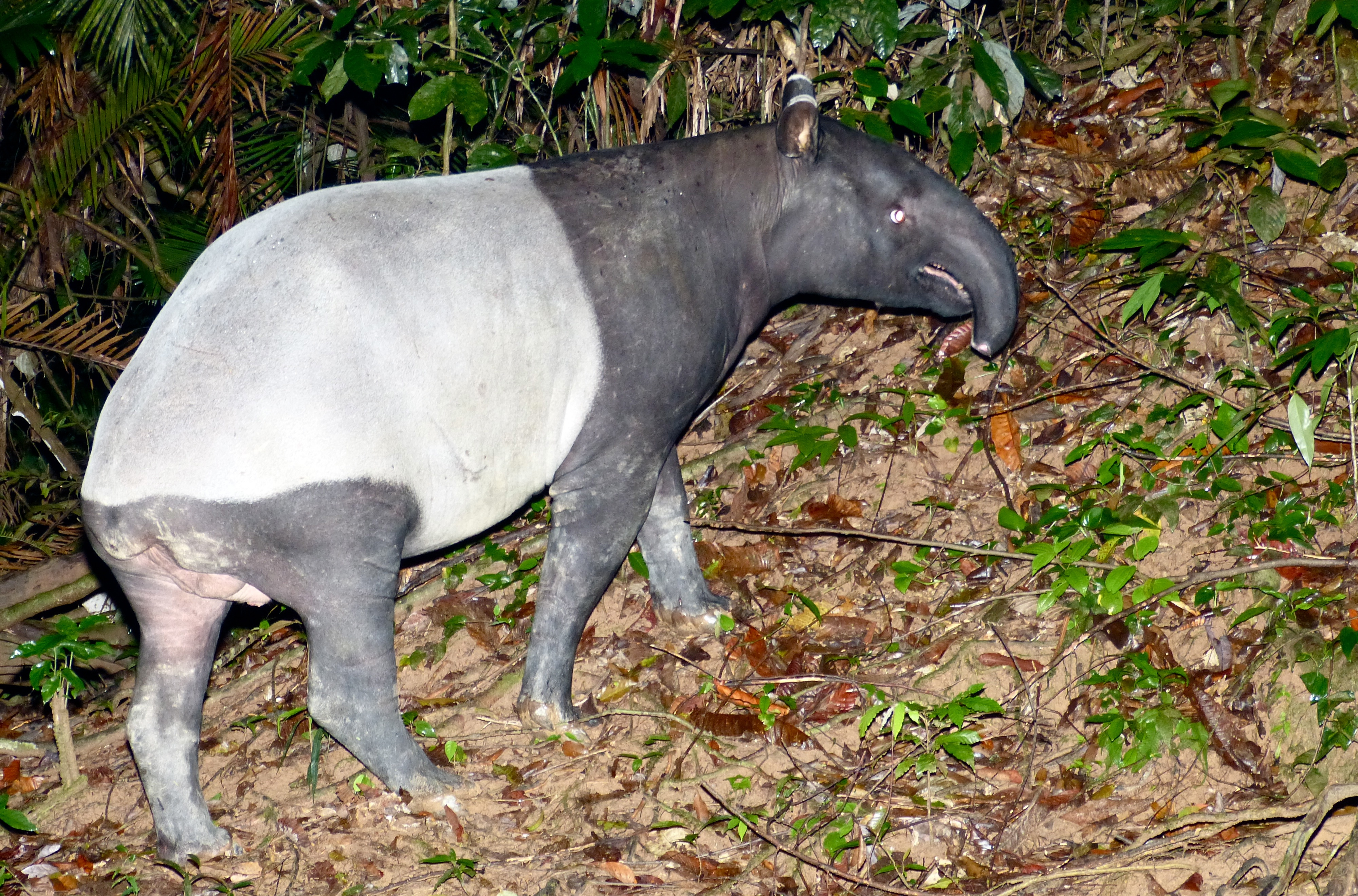 Taman Negara NP, Pahang, MALAYSIA